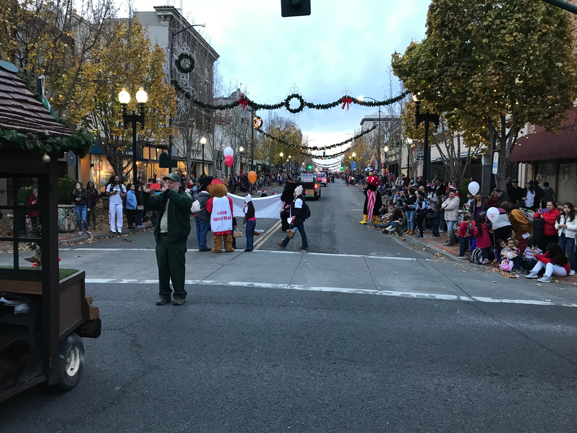 Vallejo's Mad Hatter Holiday Parade 2017